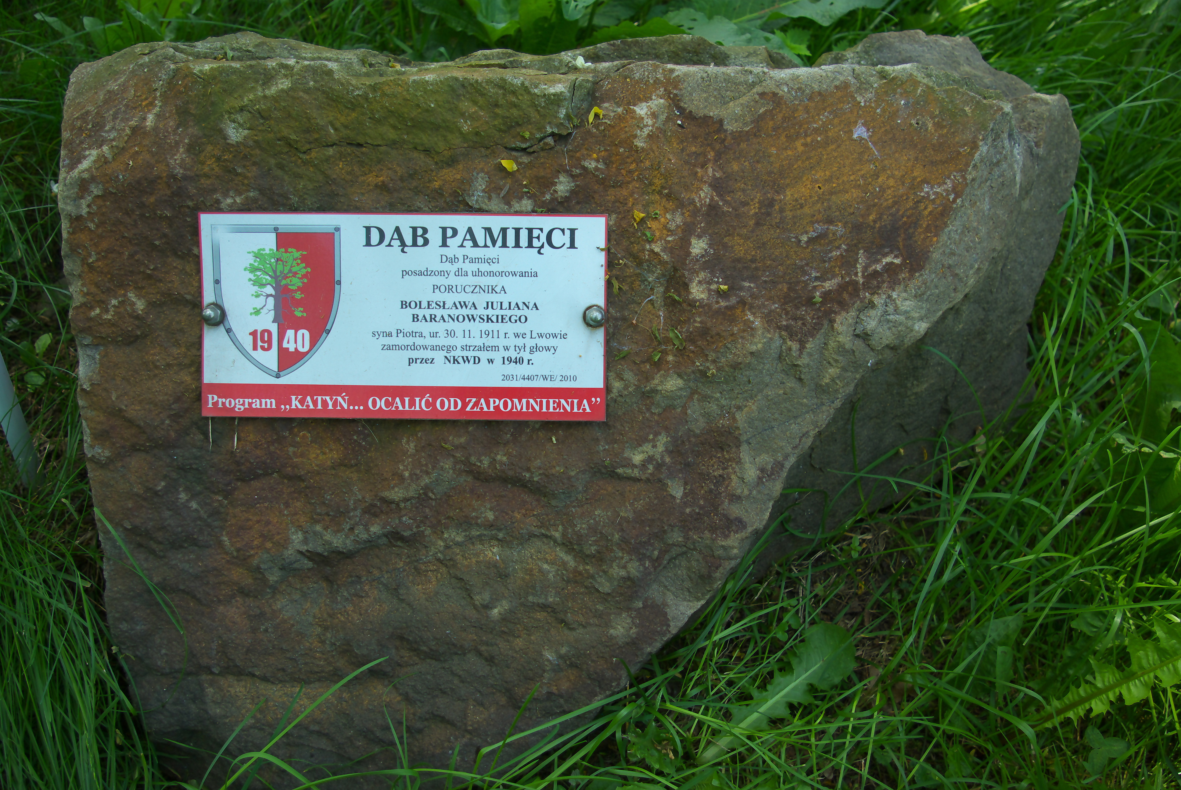 Dąb Pamięci honorujący Bolesława Baranowskiego w Trepczy